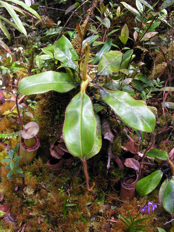 Nepenthes pilosa plant, Bukit Batu Lesung, Borneo